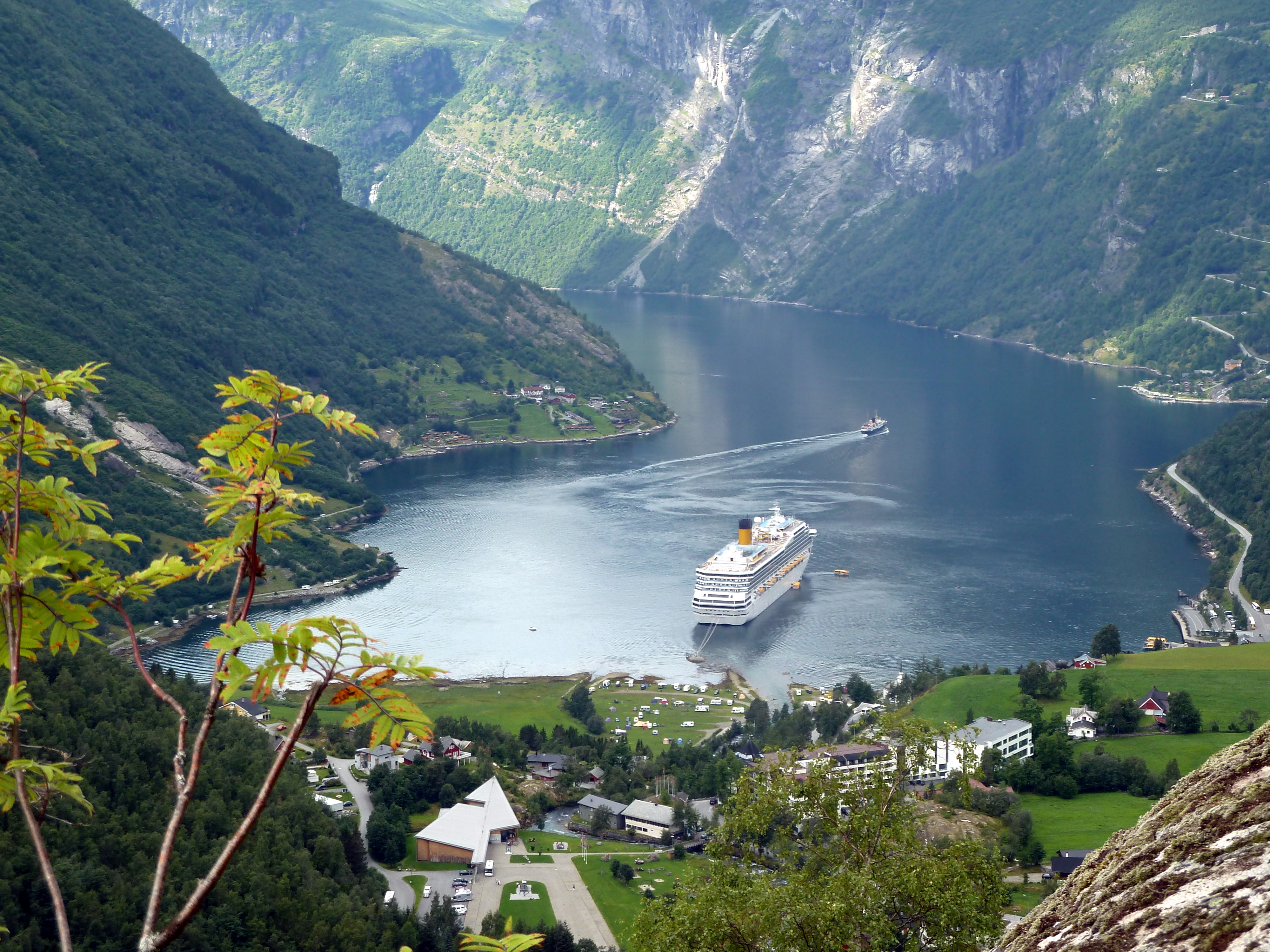 Geiranger - Costa Magica im engen Fjord vom Aussichtspunkt Flydalsjuvet aus